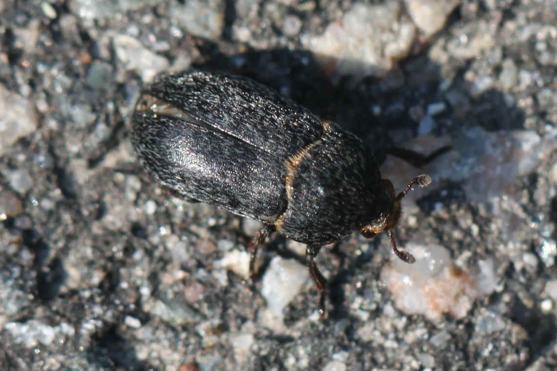 Dermestes laniarius am 3.4.2017 in Walldorf/Baden